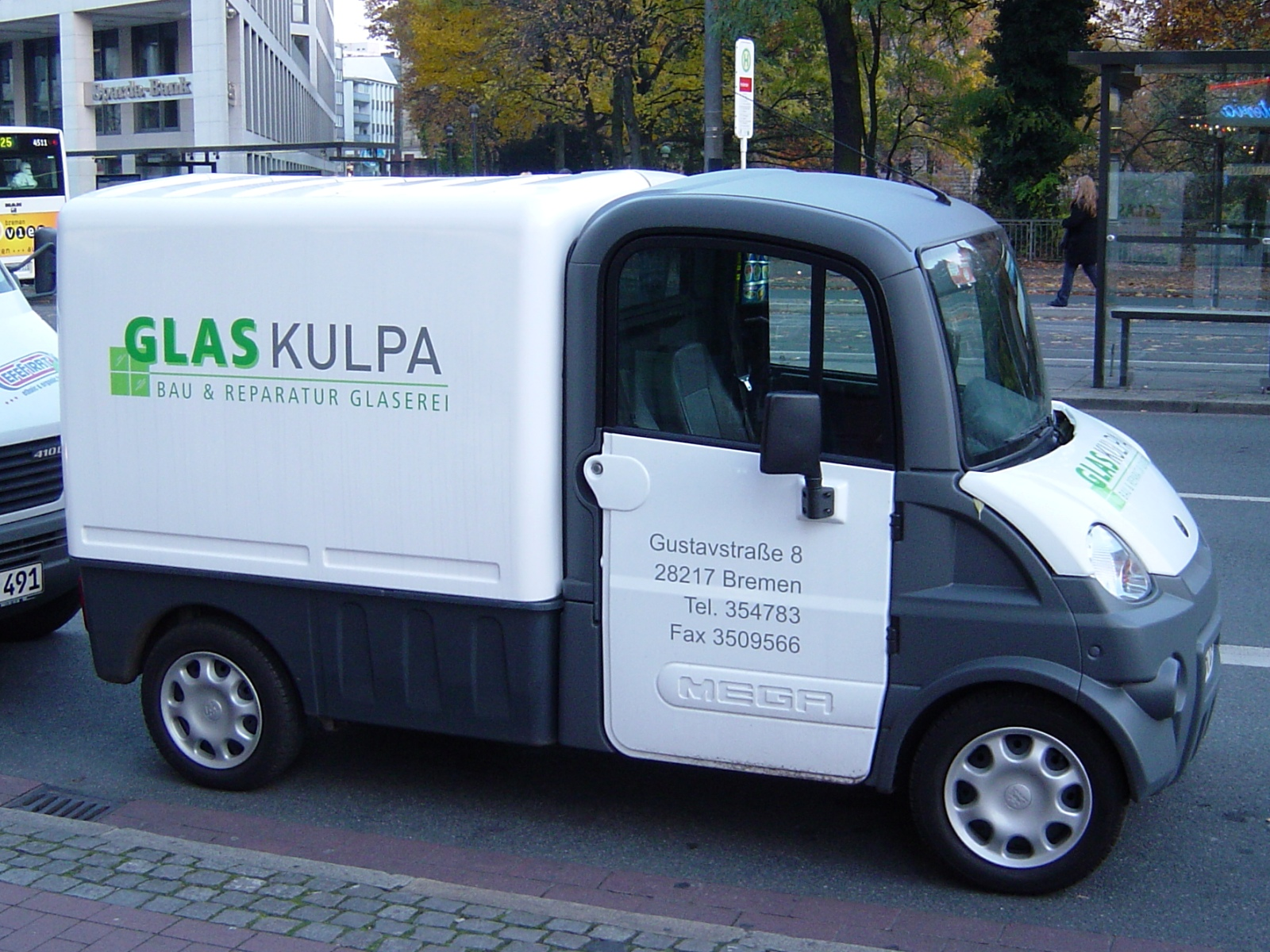 "Glas Kulpa" Mega MultiTruck in Bremen